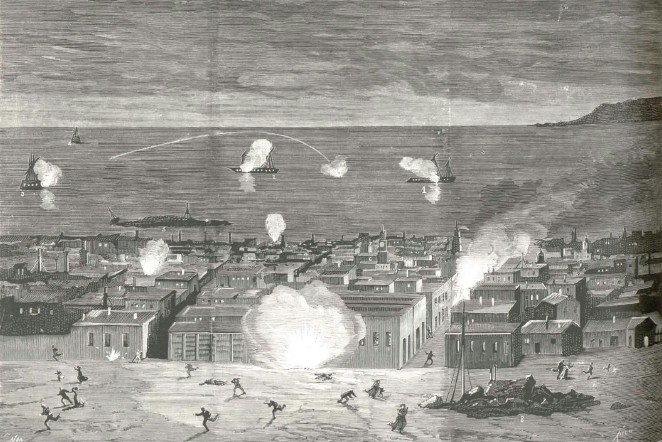 Bombardeo de Iquique por la escuadra chilena